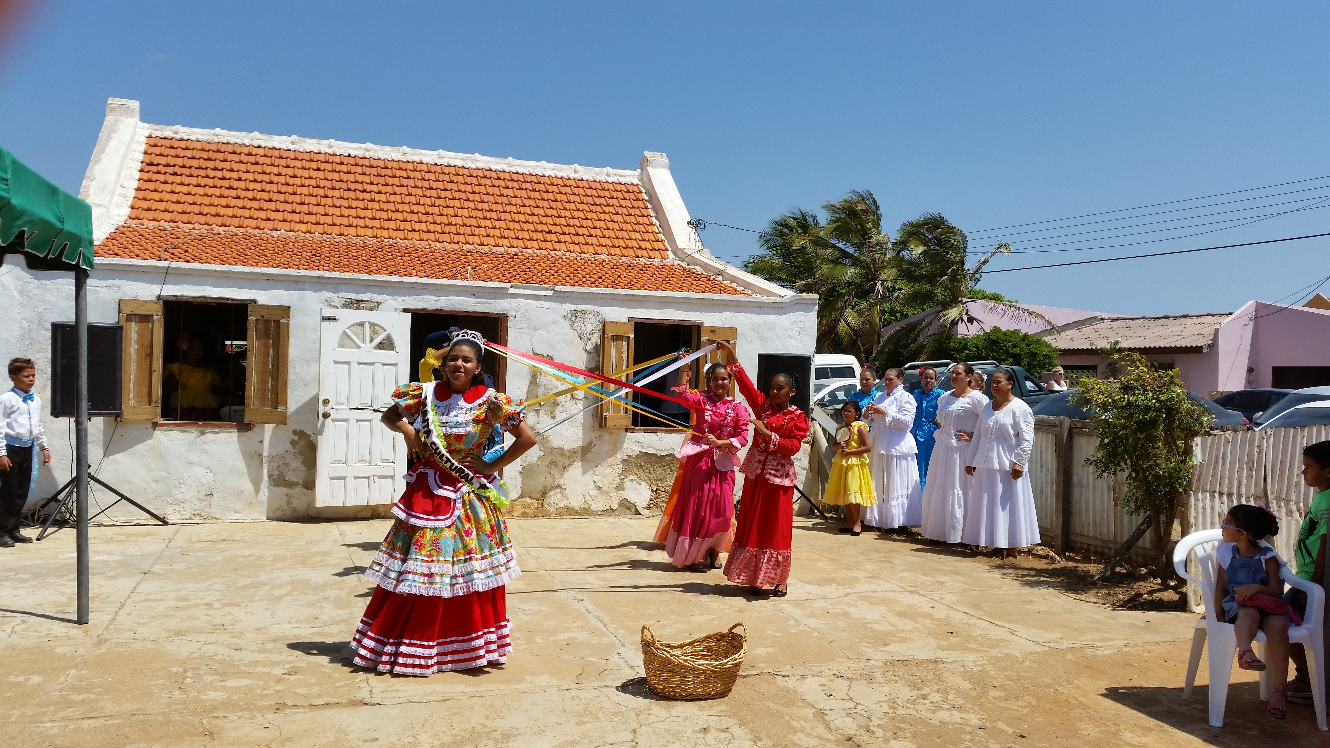 Baile di cinta FDC 2015